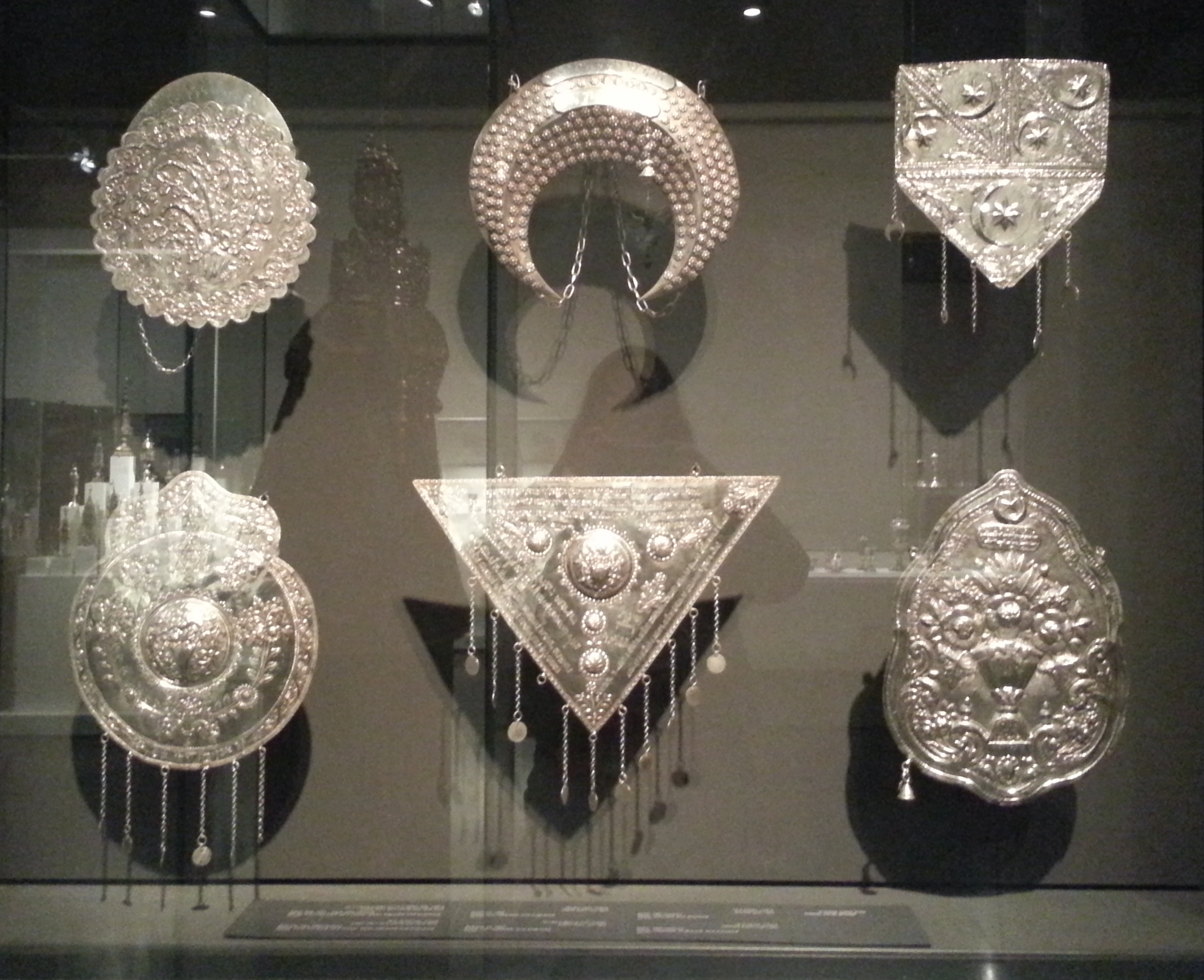 מגנים לספר תורה עשוים כסף, ומרוקעים דימויי סהר, יהדות טורקיה. צולם במוזיאון ישראל